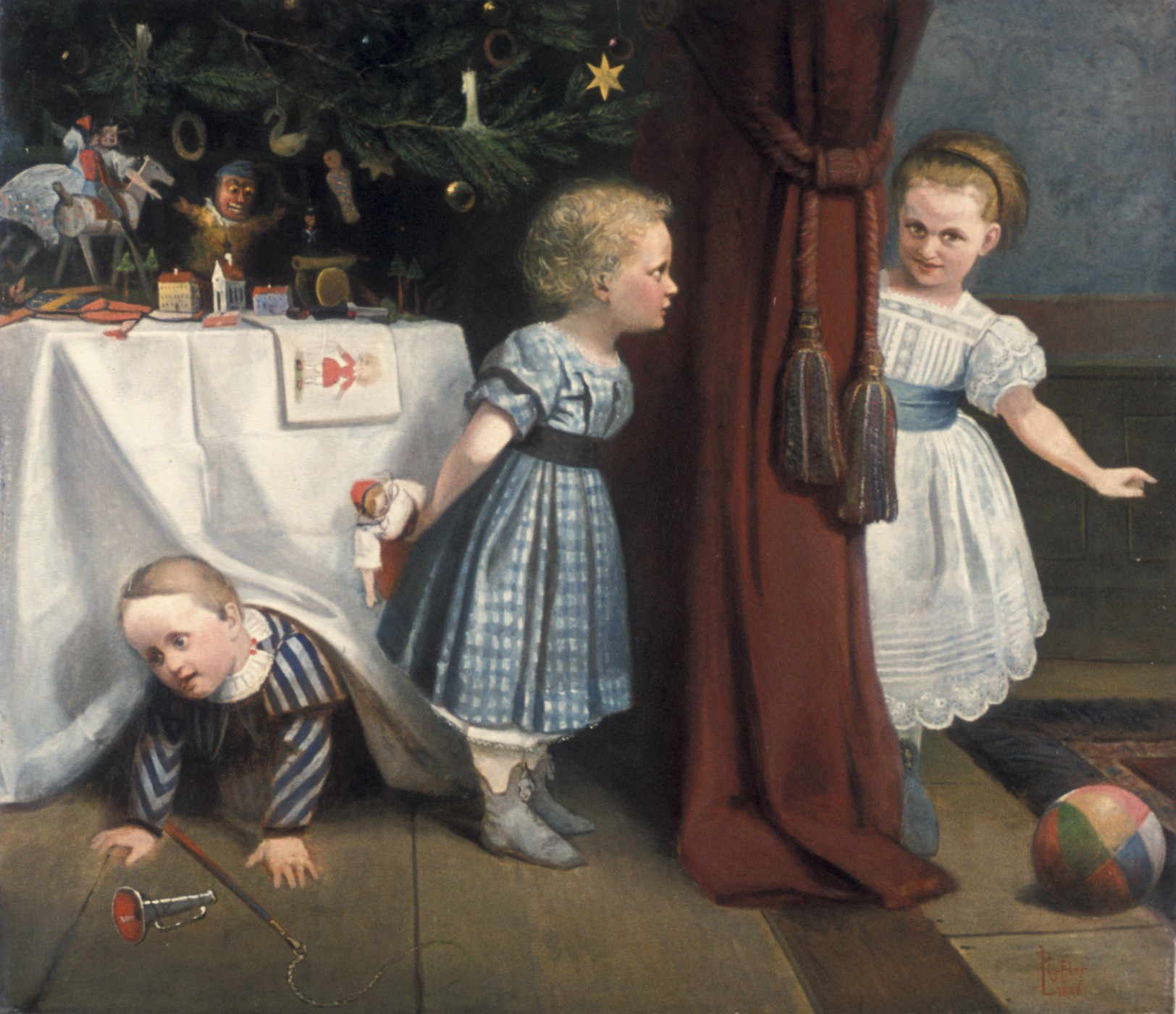 Die Kinder der Familie Buderus. Öl auf Leinwand. Frankfurt (Main), Historisches Museum, Inv.-Nr. B 69 : 7. Foto Marburg, Aufnahme-Nr. LAC 3.081/2